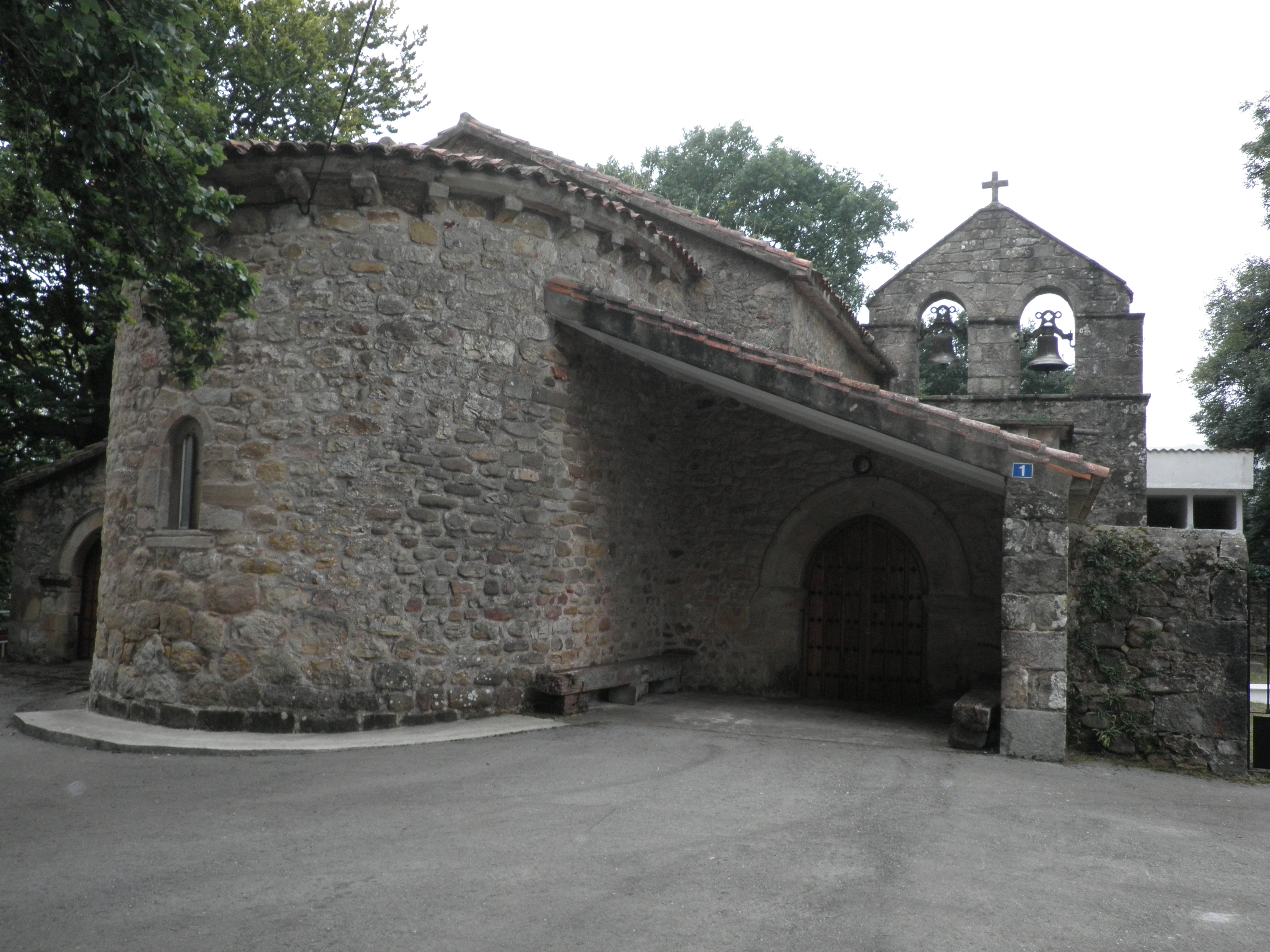 Àbsis i campanar de l'església parroquial de l'Assumpció a Acereda (Santiurde de Toranzo, Cantàbria). Romànic de transició.